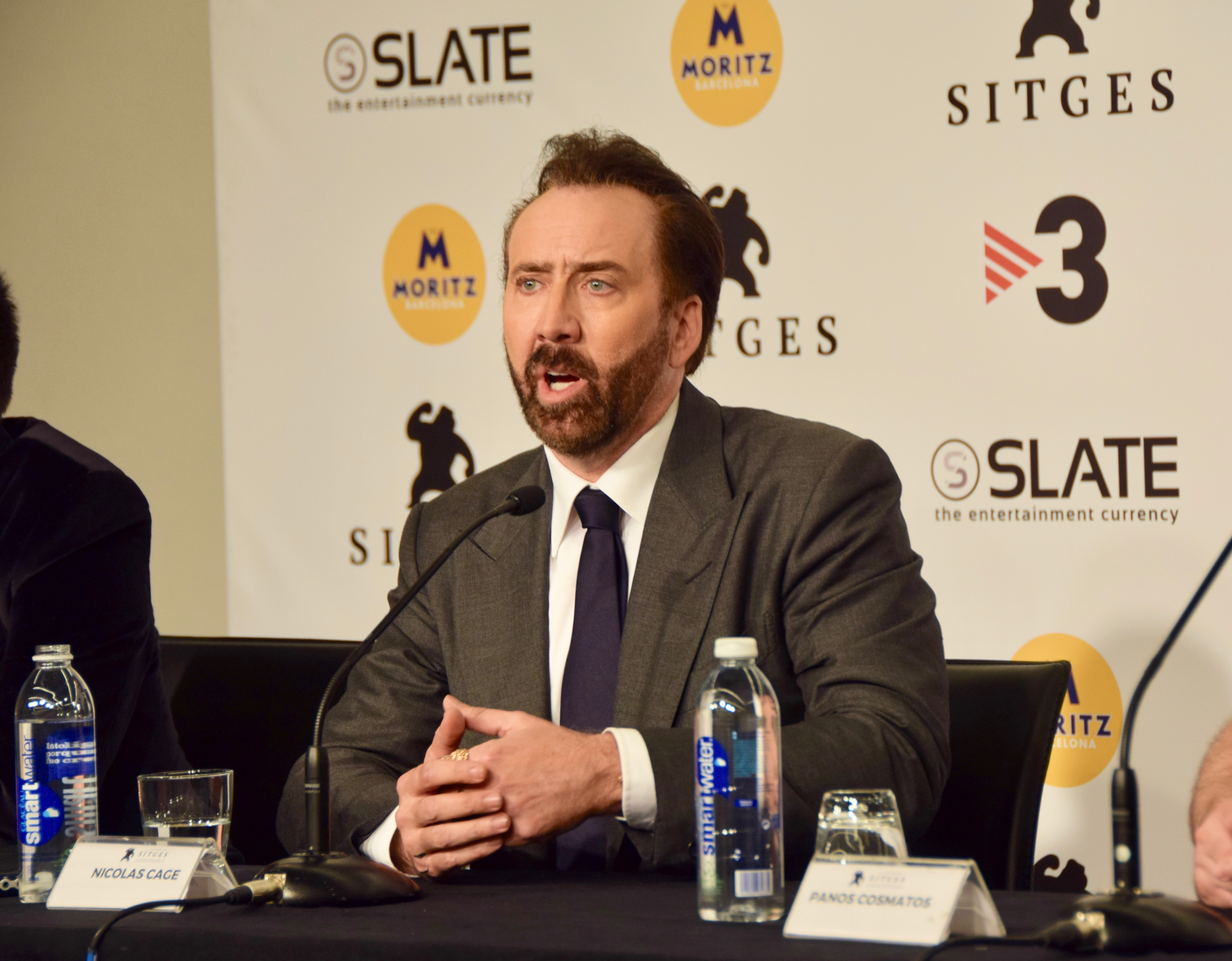 Festival de cinema de Sitges 2018